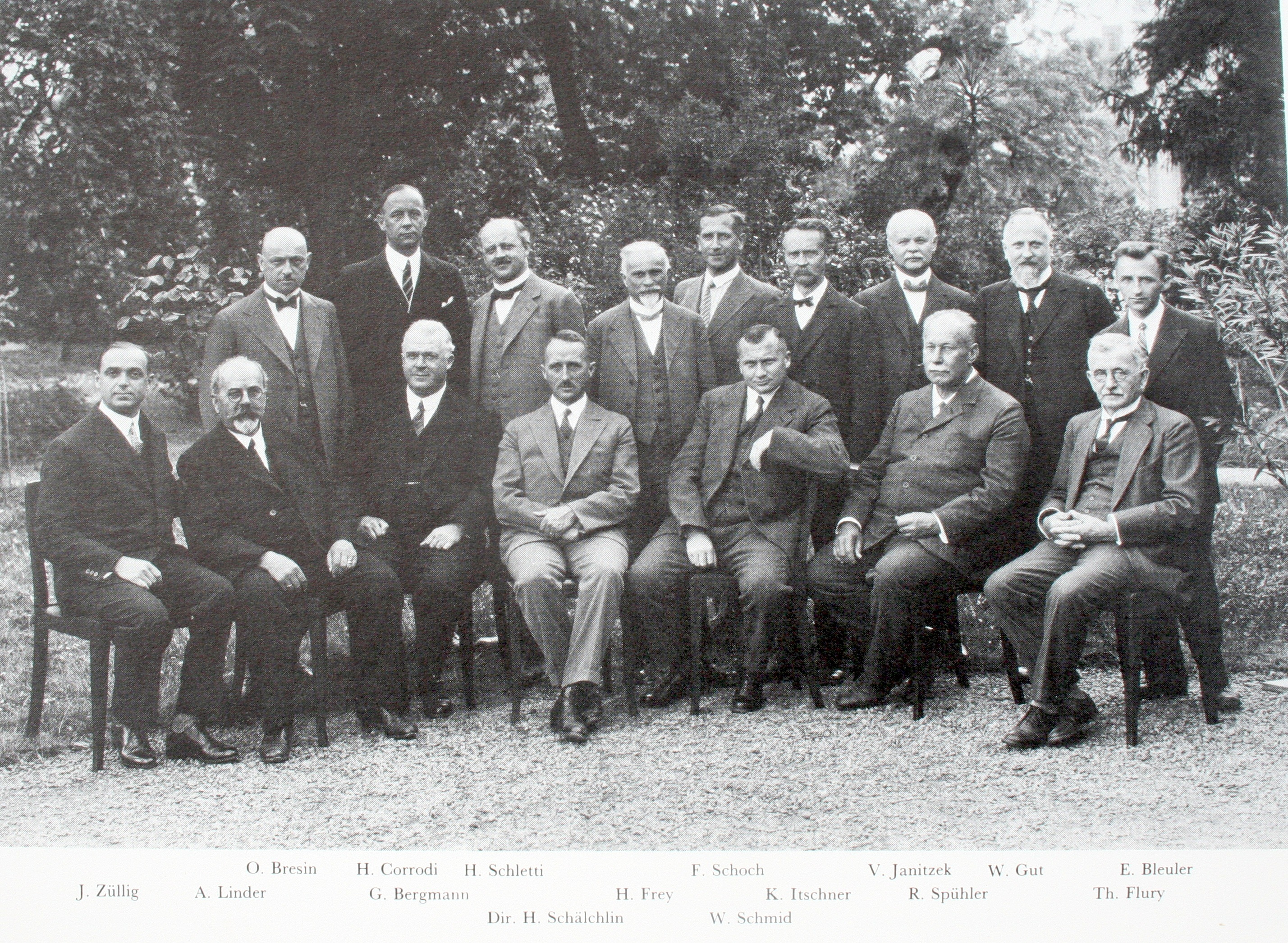 ehemalige Lehrerschaft der Kantonsschule Küsnacht